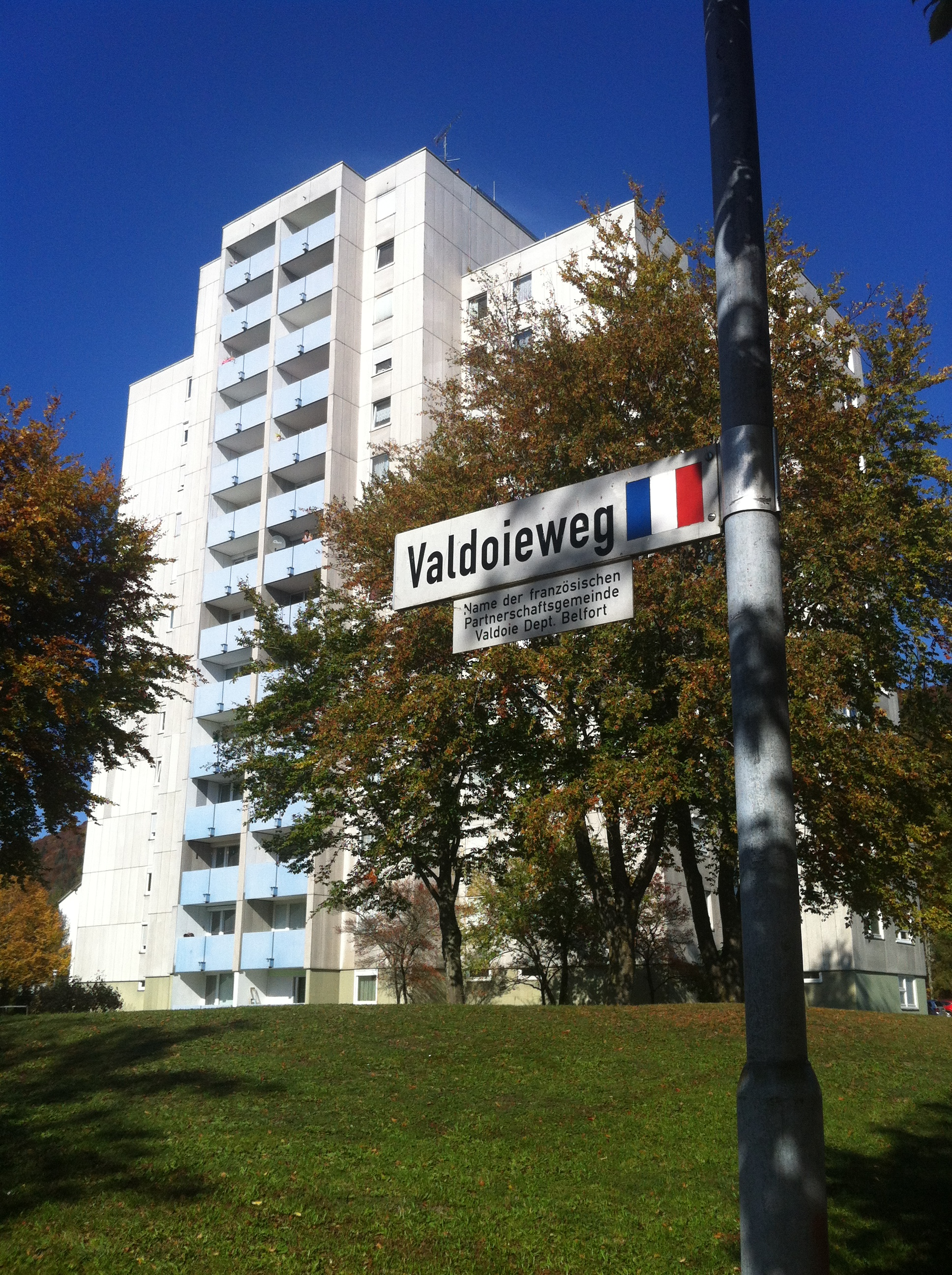 Blumberg, Stadt im Schwarzwald-Baar-Kreis in Baden-Württemberg. Das Hochhaus in der Stadt. Valdoie ist die französische Partnerstadt Blumbergs.